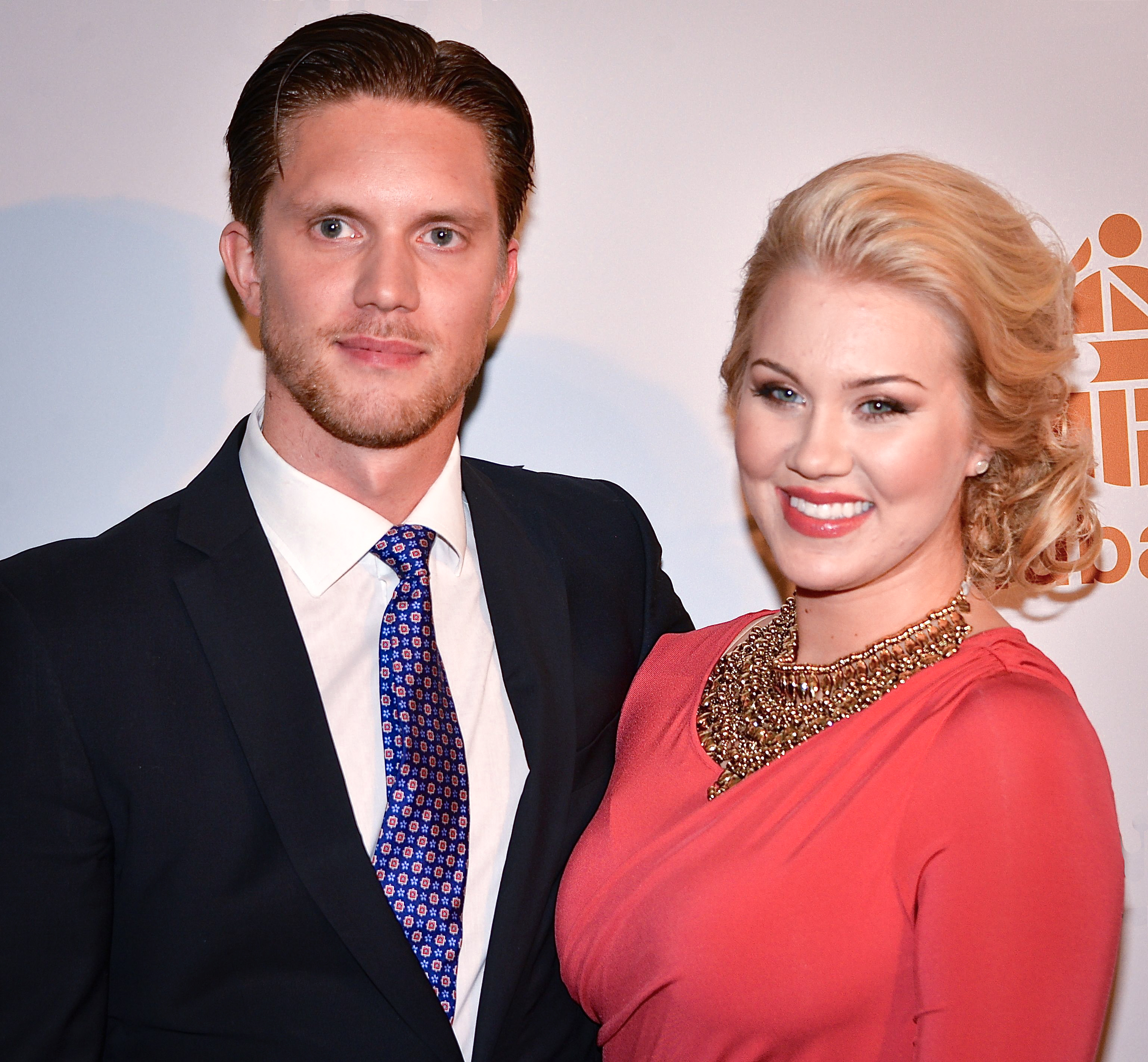 Odd Spångberg & Isabella Löwengrip på på Guldbaggegalan 2013 den 21 januari 2013.